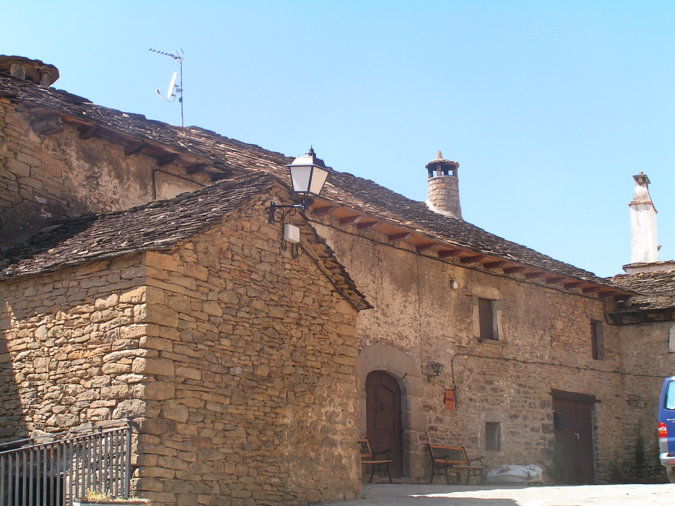 Ambista d'una casa d'o lugar de Botaya, en o termín monezipal de Chaca (Chazetania, Aragón)